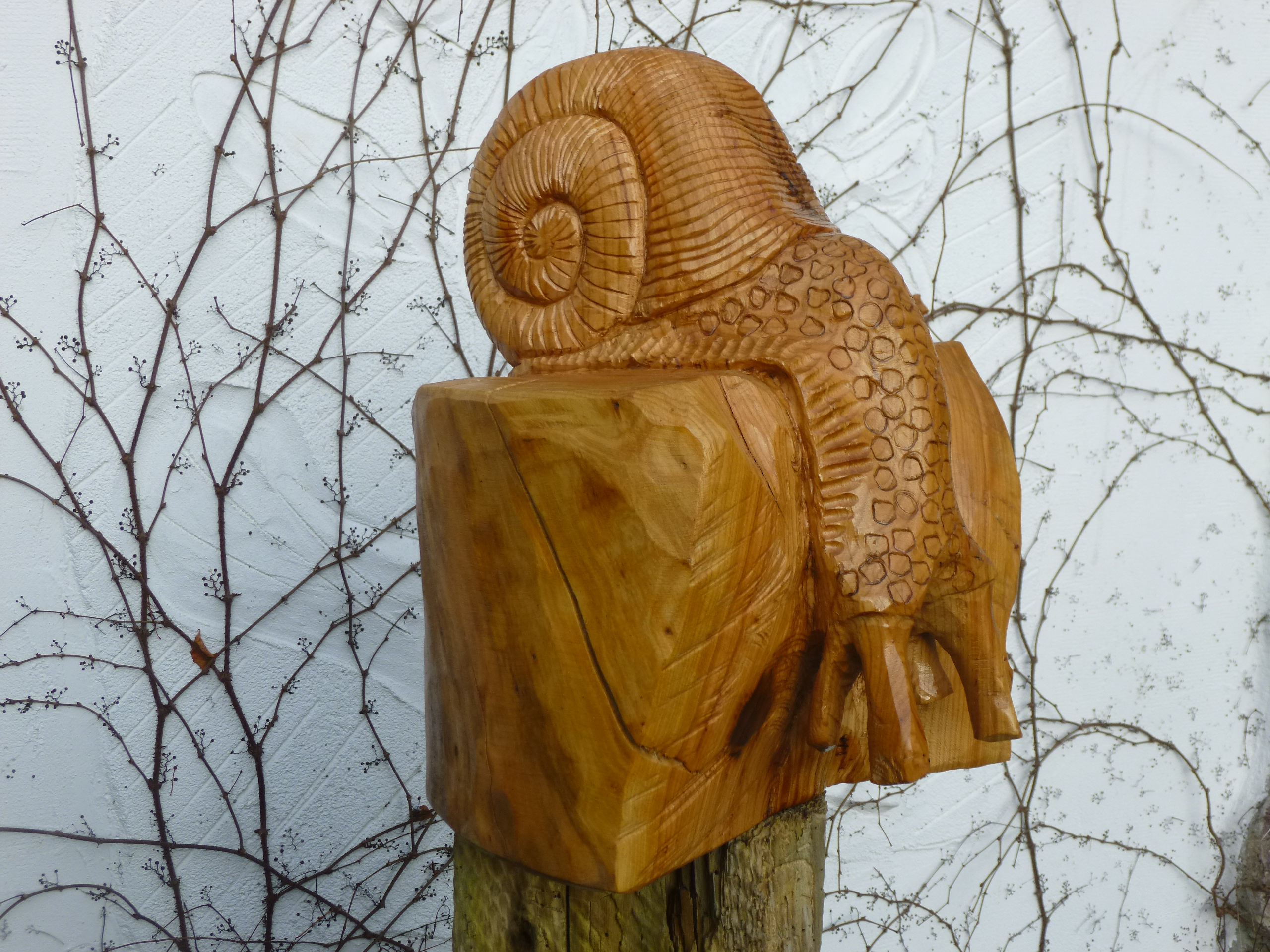 Geschnitzte Schnecke in Fincken